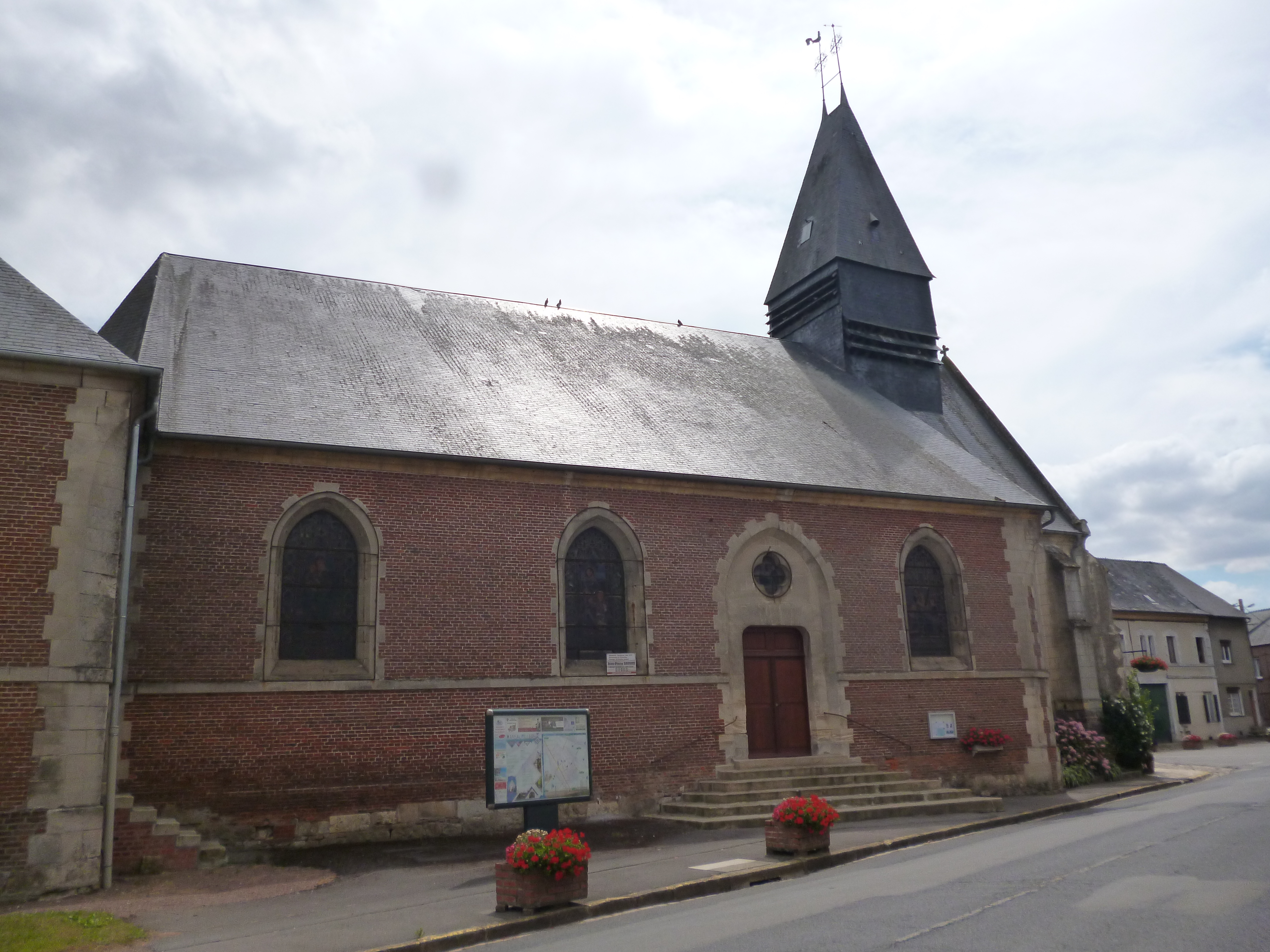 Eglise Saint-Léger d'Ansauvillers (Oise)